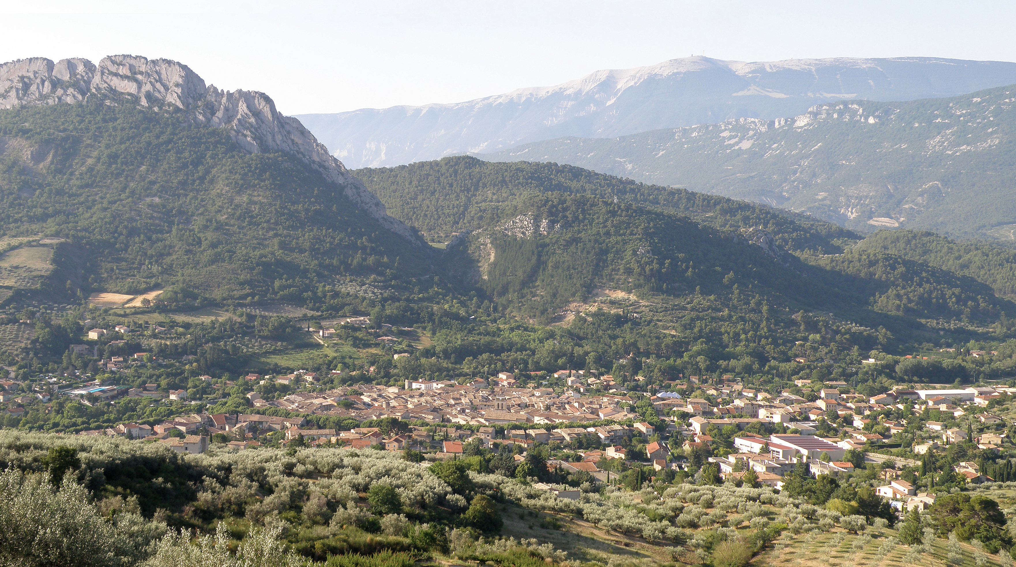 Buis-les-Baronnies (Drôme, France). Vue générale depuis les Pialats. Regard vers le sud.